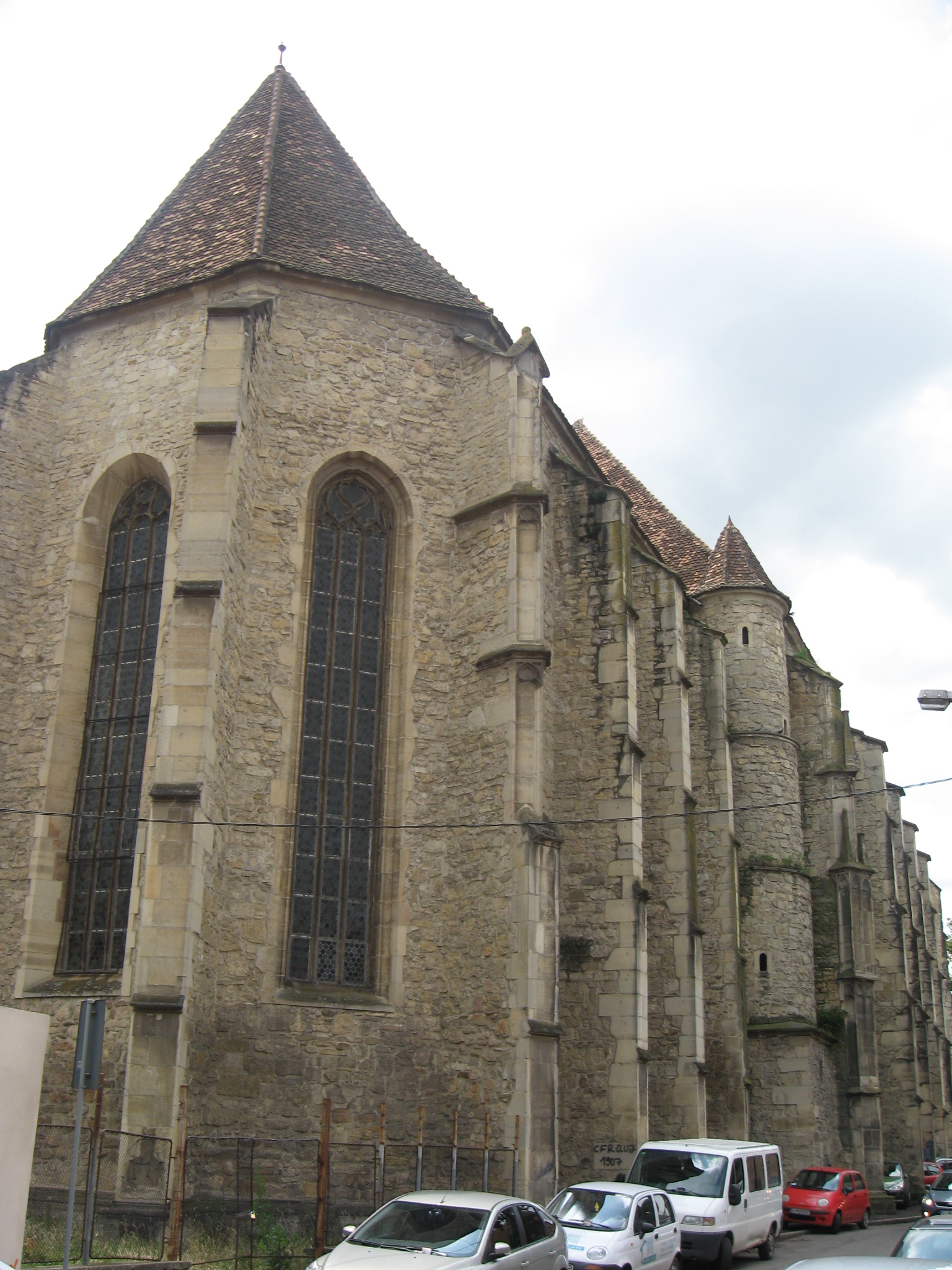 Cluj-Napoca, Biserica Reformată-Calvină (str. M.Kogălniceanu nr.21)